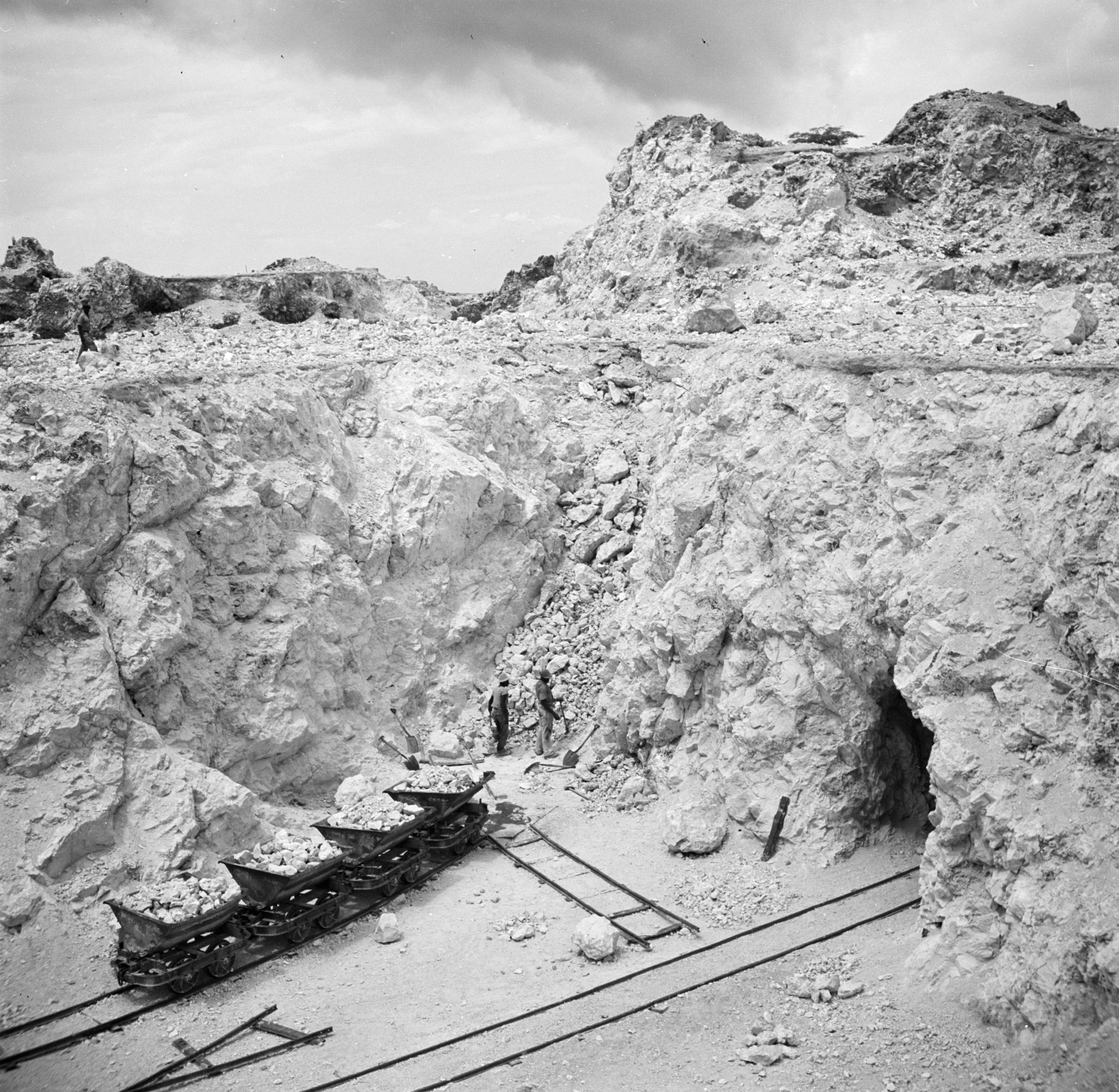 Collectie / Archief : Fotocollectie Van de Poll Reportage / Serie : Reis naar Suriname en de Nederlandse Antillen Beschrijving : De fosfaatmijn van het bedrijf Curaçao bij de Tafelberg op Curaçao Datum : 1947 Locatie : Curaçao Trefwoorden : mijnen, rotsen, vervoer Fotograaf : Poll, Willem van de, [onbekend] Auteursrechthebbende : Nationaal Archief Materiaalsoort : Negatief (zwart/wit) Nummer archiefinventaris : bekijk toegang 2.24.14.02 Bestanddeelnummer : 252-7414